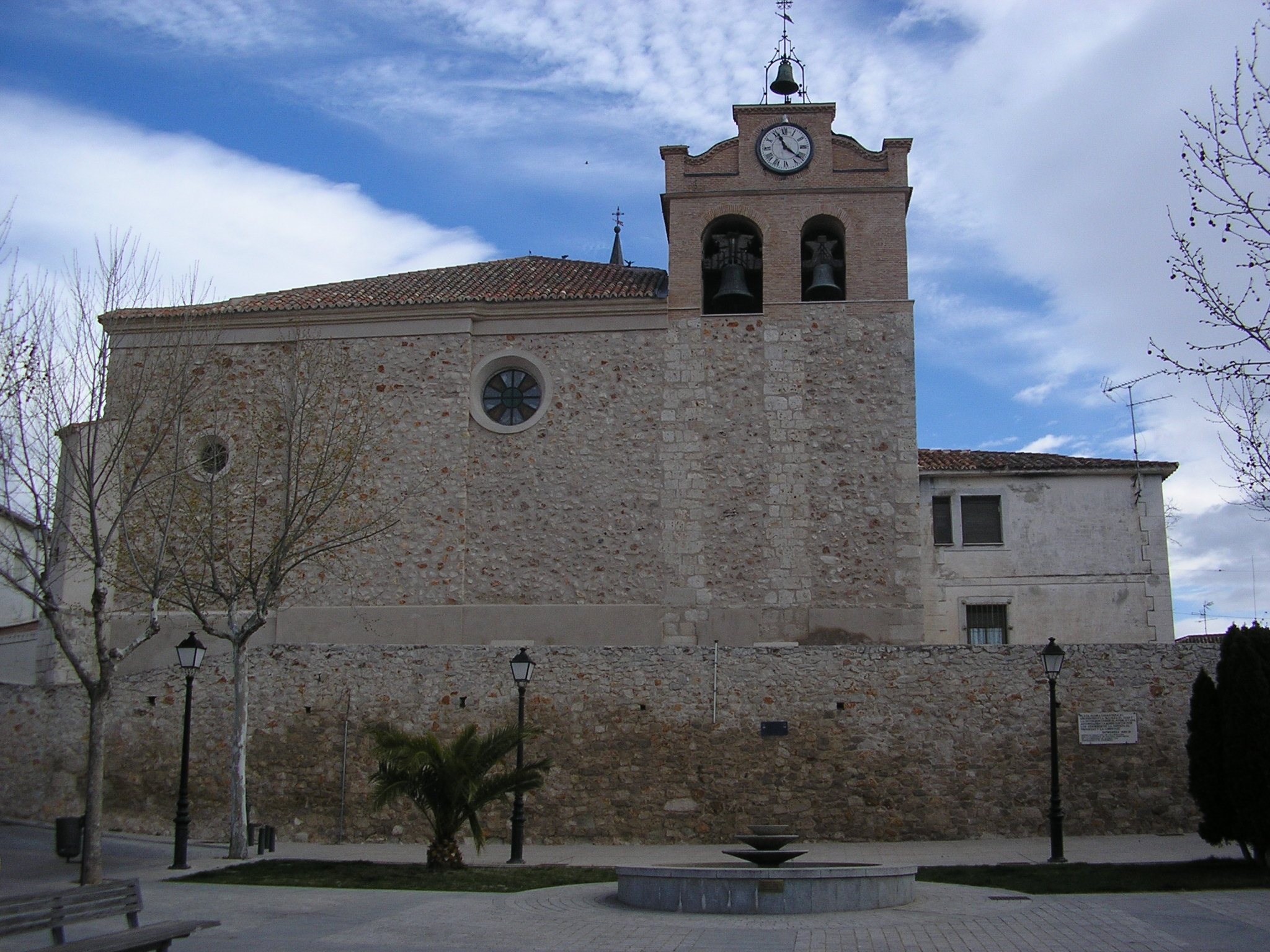 La Iglesia de Estremera, un pueblo a 65 km al sureste de la ciudad de Madrid.